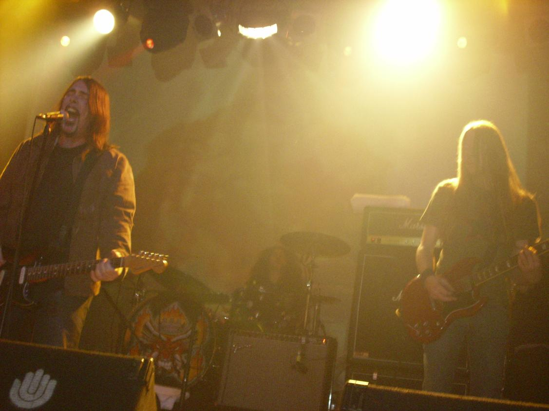 Sala Heineken Madrid , 28 Nov 2008